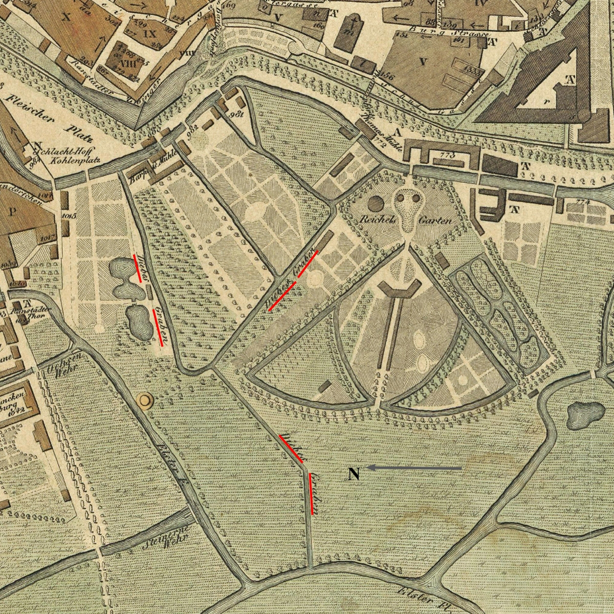 Der Diebesgraben auf einem Leipziger Stadtplanausschnitt westlich der Innenstadt von 1830